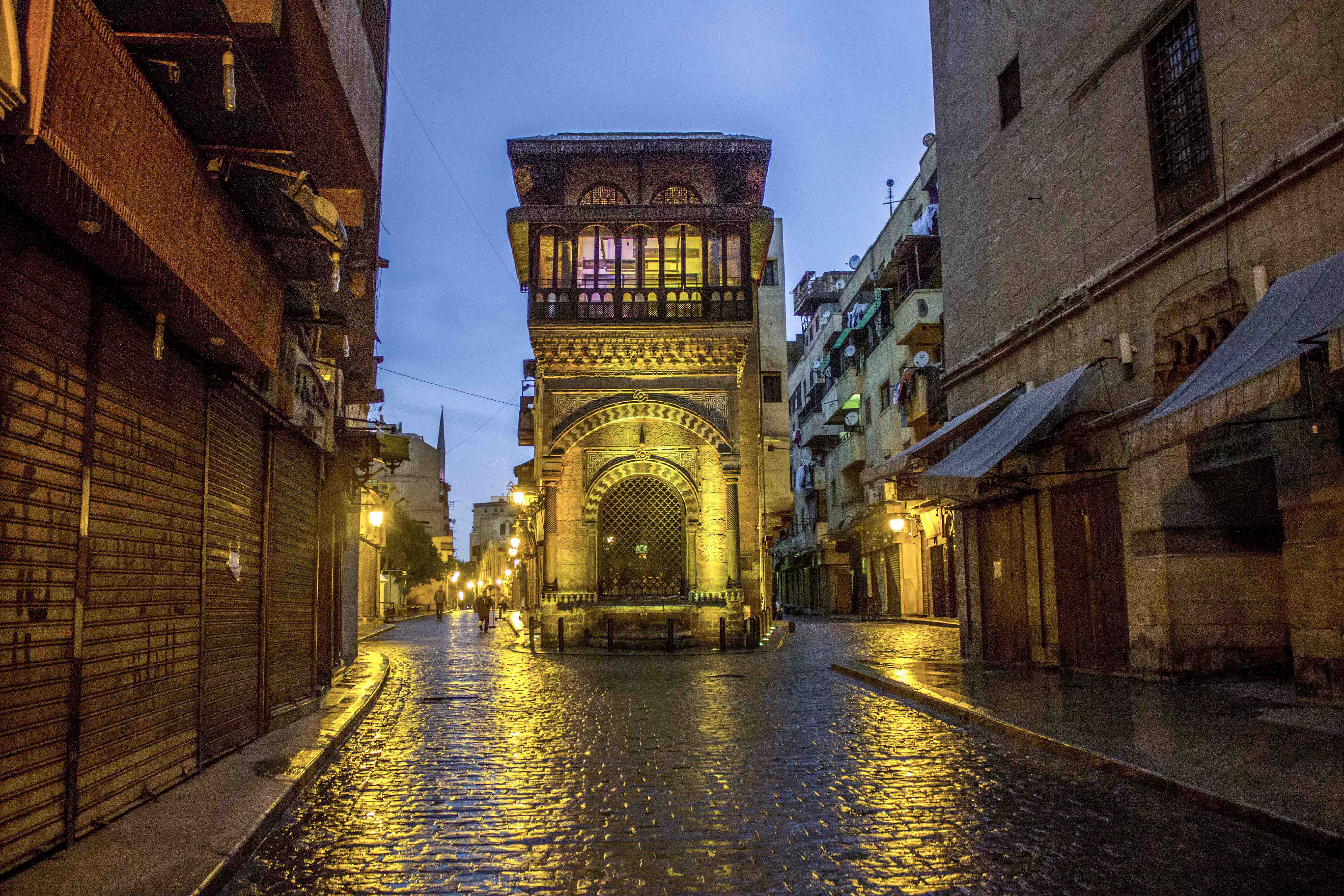 شارع المعز في بداية يومة